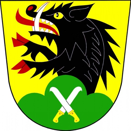 znak, Vepřová, okres Žďár nad Sázavou